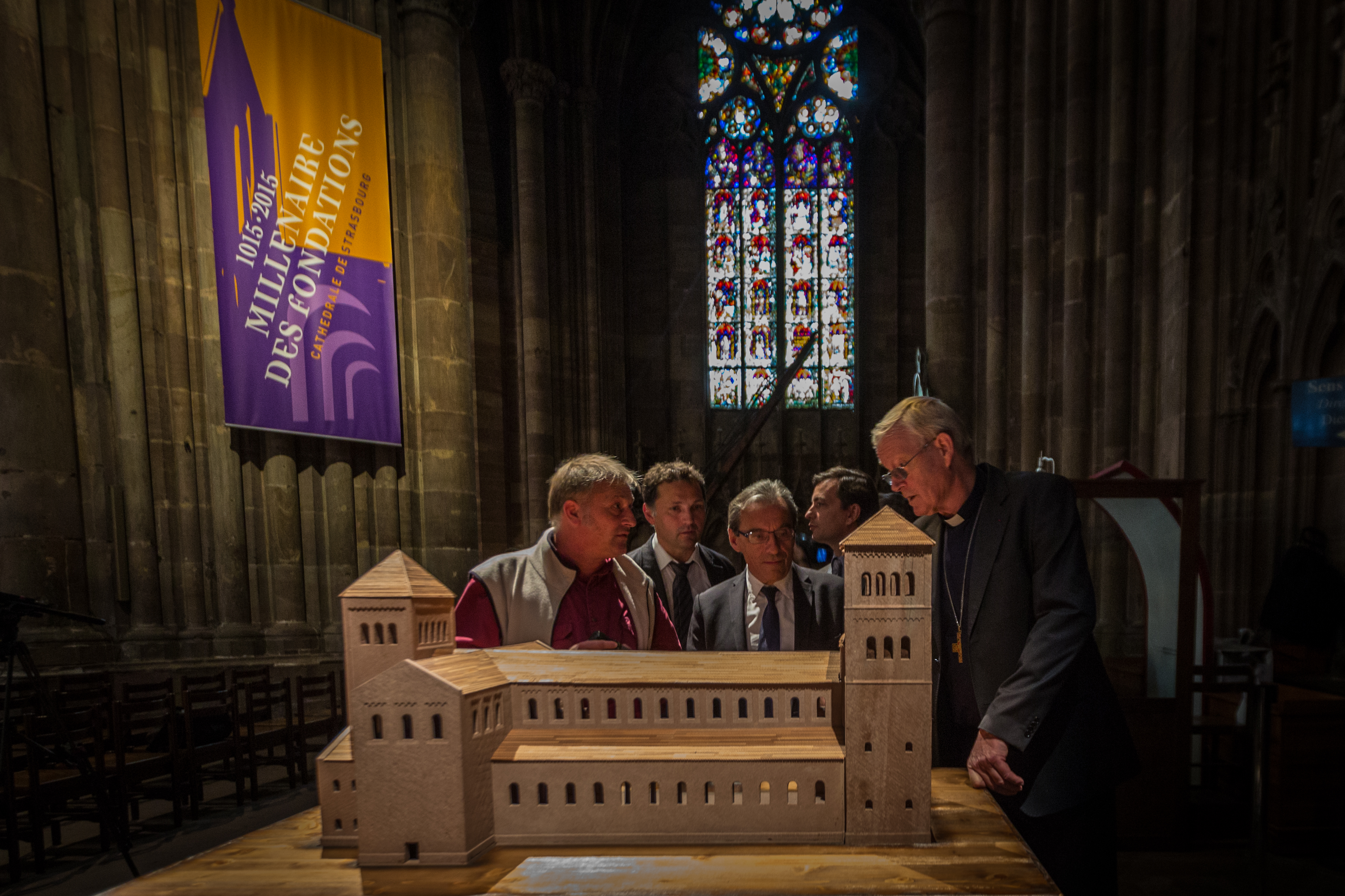 Millénaire des fondations de la Cathédrale Notre-Dame de Strasbourg 19 septembre 2014. Présentation de la maquette de la cathédrale othonienne (1015) à Mgr Jean-Pierre Grallet et Roland Ries.